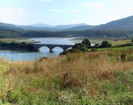 Vista del puente del FEVE y la desembocadura del río Masma en la Ría de Foz.